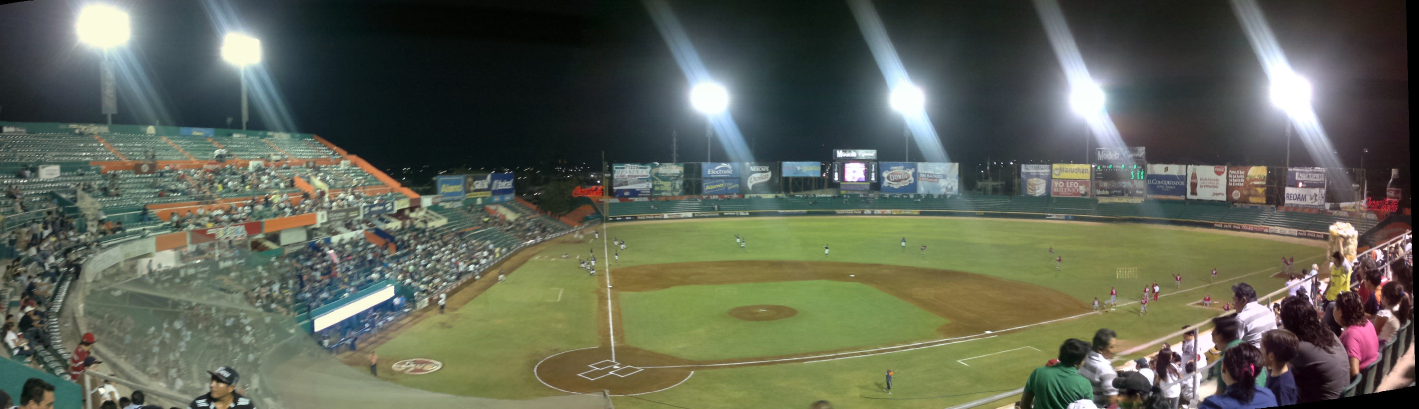 Un panorama del Estadio Kukulcán, en la ciudad de Mérida, Yucatán.